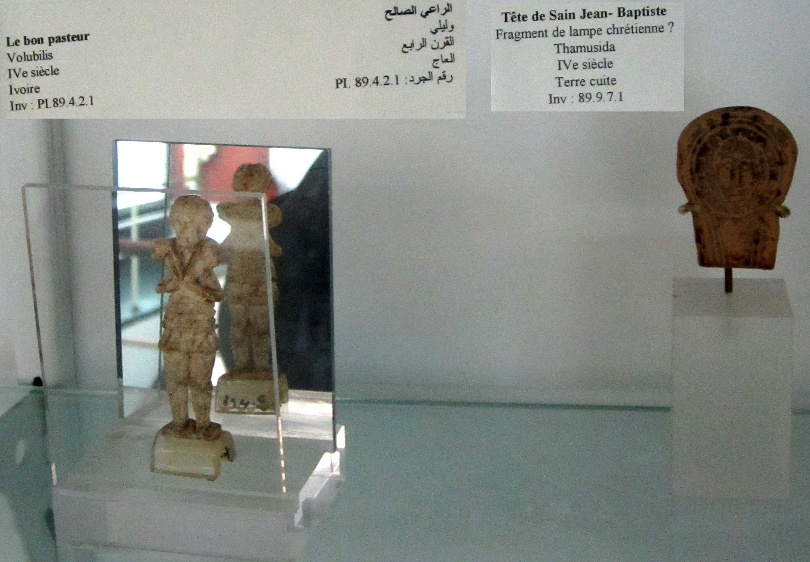 Le Musée archéologique de Rabat. Экспонат археологического музея Рабата. Добрый пастырь (слева, Волюбилис, IV век, слоновая кость). Глава святого Иоанна Крестителя, фрагмент христианской лампады? (IV век, терракот). UNESCO